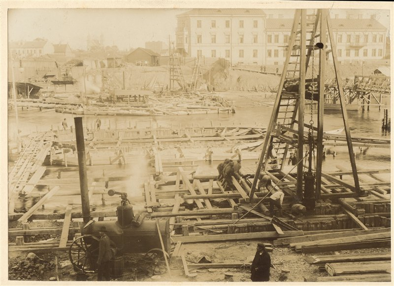 Vilnius, Žvėryno tilto statyba apie 1906